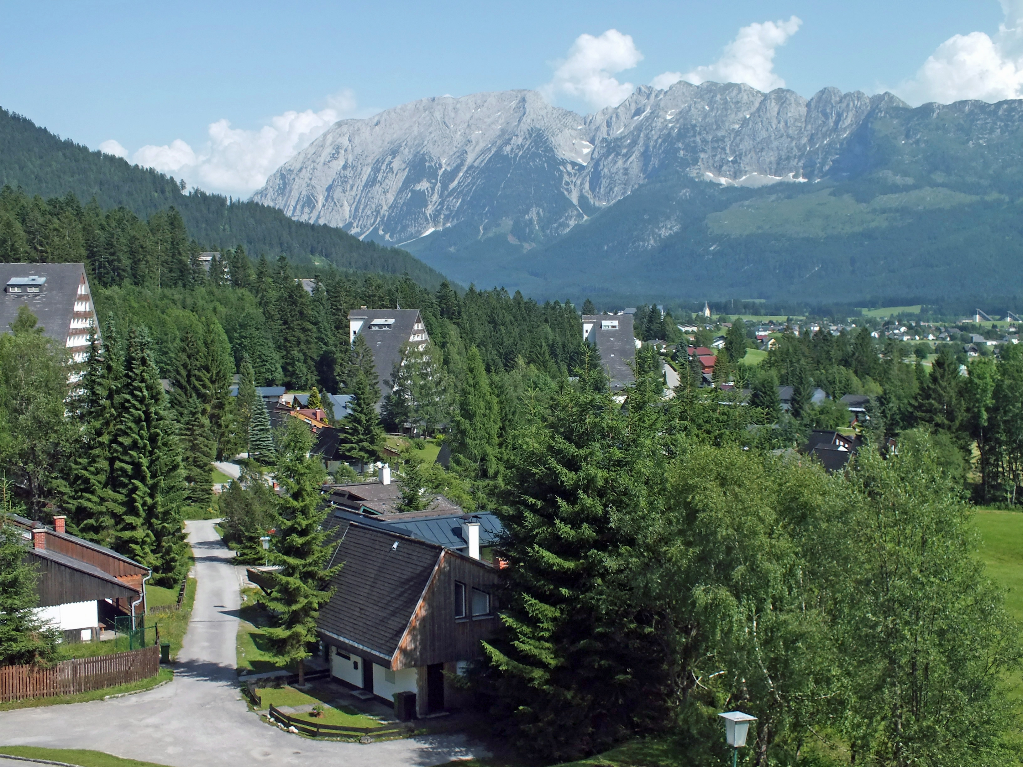 Blick in die Feriensiedlung Sonnenalm in Bad Mitterndorf.Im Hintergrund der Grimming